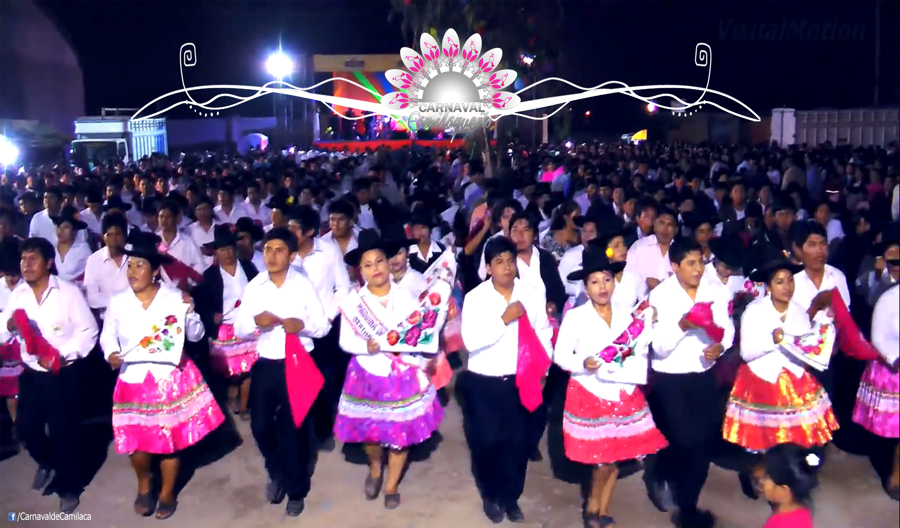 Carnaval Camilaqueño, es una festividad camilaqueña, donde principalmente es bailada al compás de nuestra danza originaria de la Orquesta, danza originaria del distrito de Camilaca. Esta festividad inicia el 01 de Febrero, dando fin el 31 de Abril. Es por ello que es considera el Carnaval mas grande de la región Tacna y del Perú. Teniendo una duración de 3 meses.